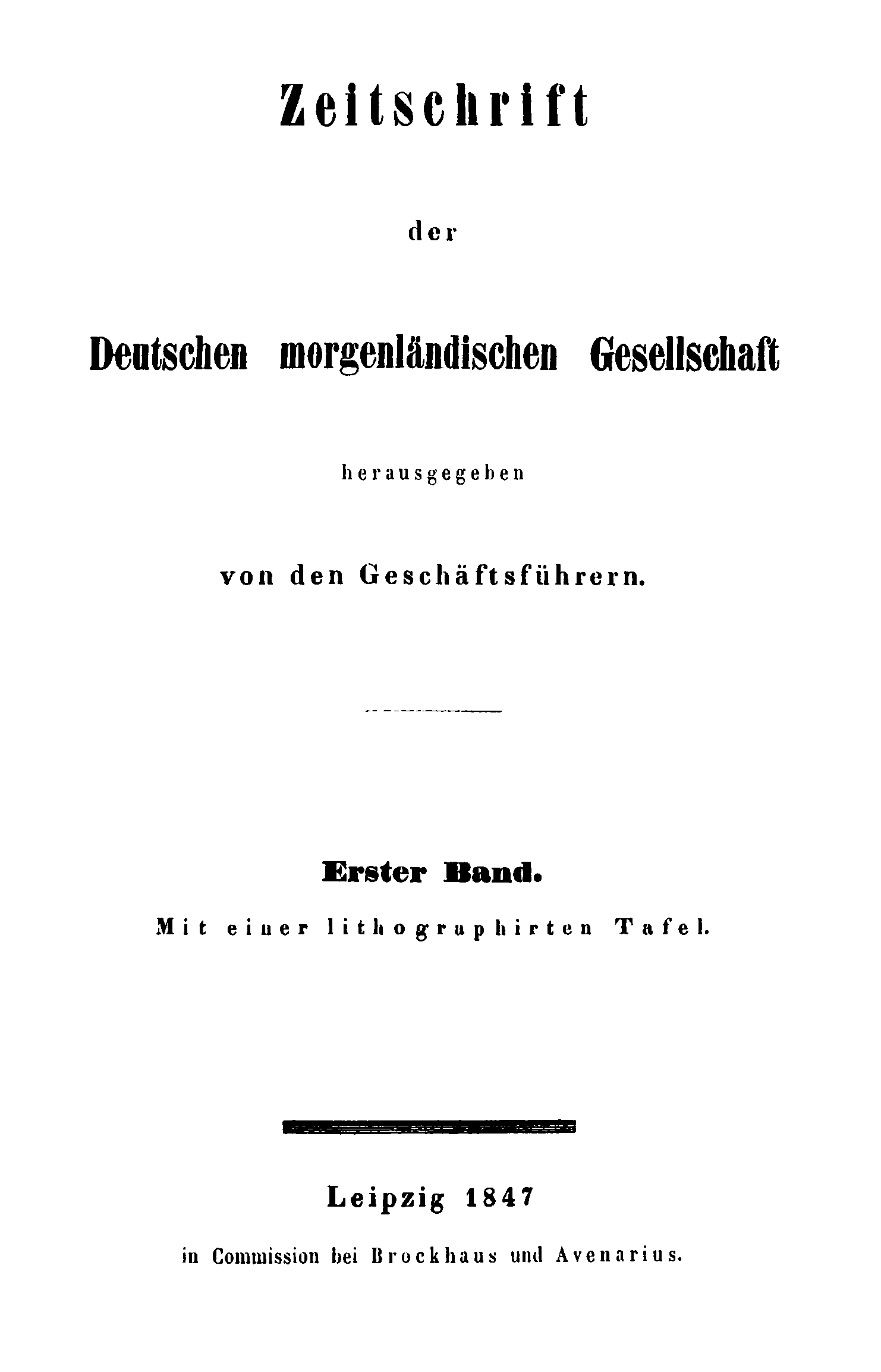 Titelseite der Zeitschrift / Title page of the periodical